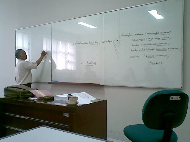 Pa Is nuju ngawulang